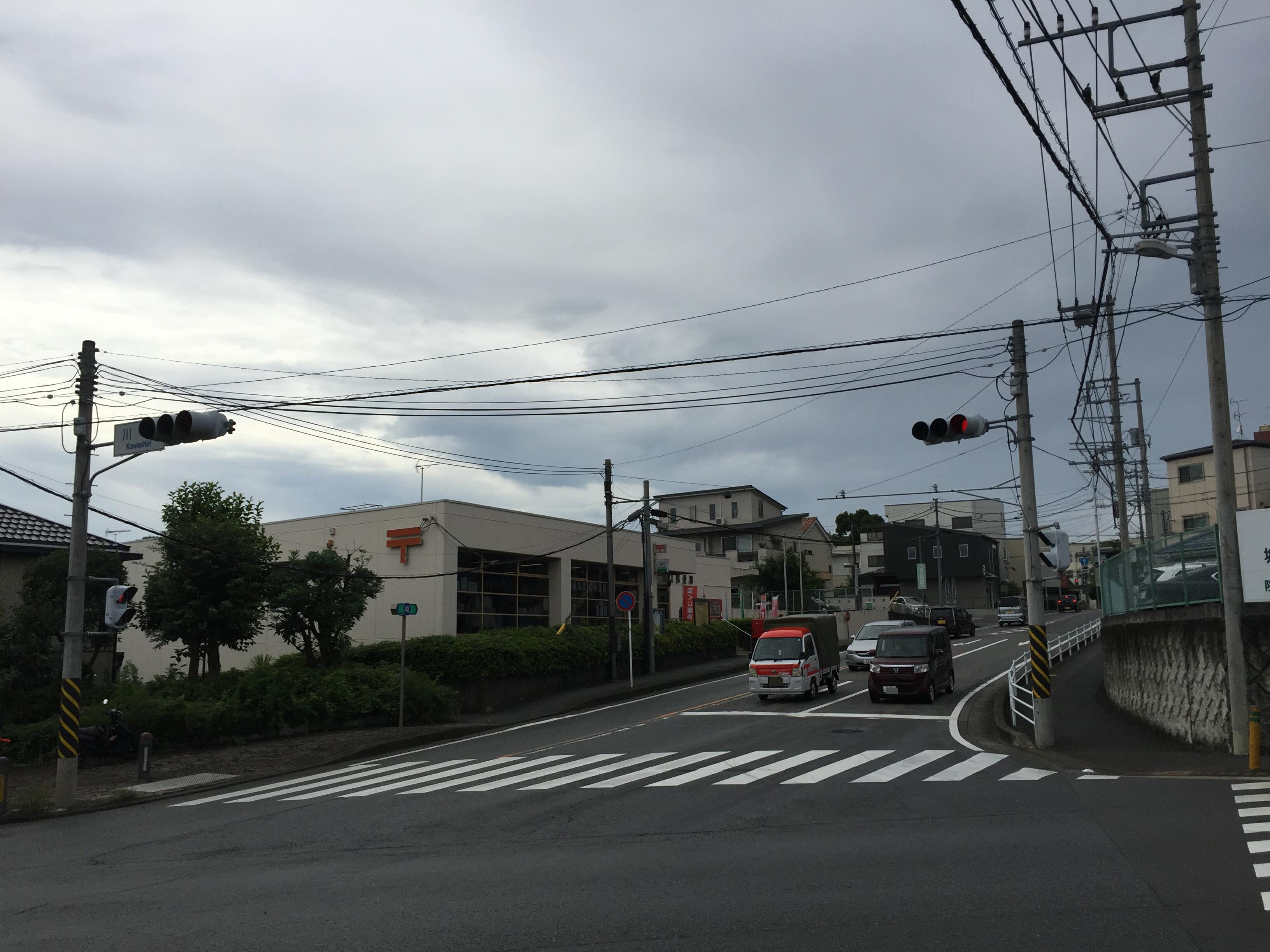 川尻交差点（相模原市緑区）。県道48号線・大戸方面。